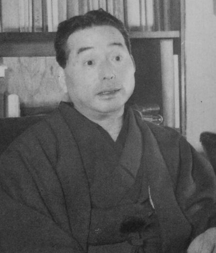 吉田富三